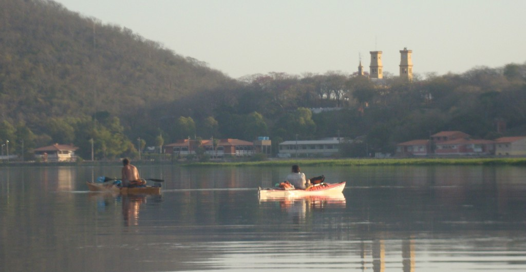 Ciudad de Fuerte Olimpo